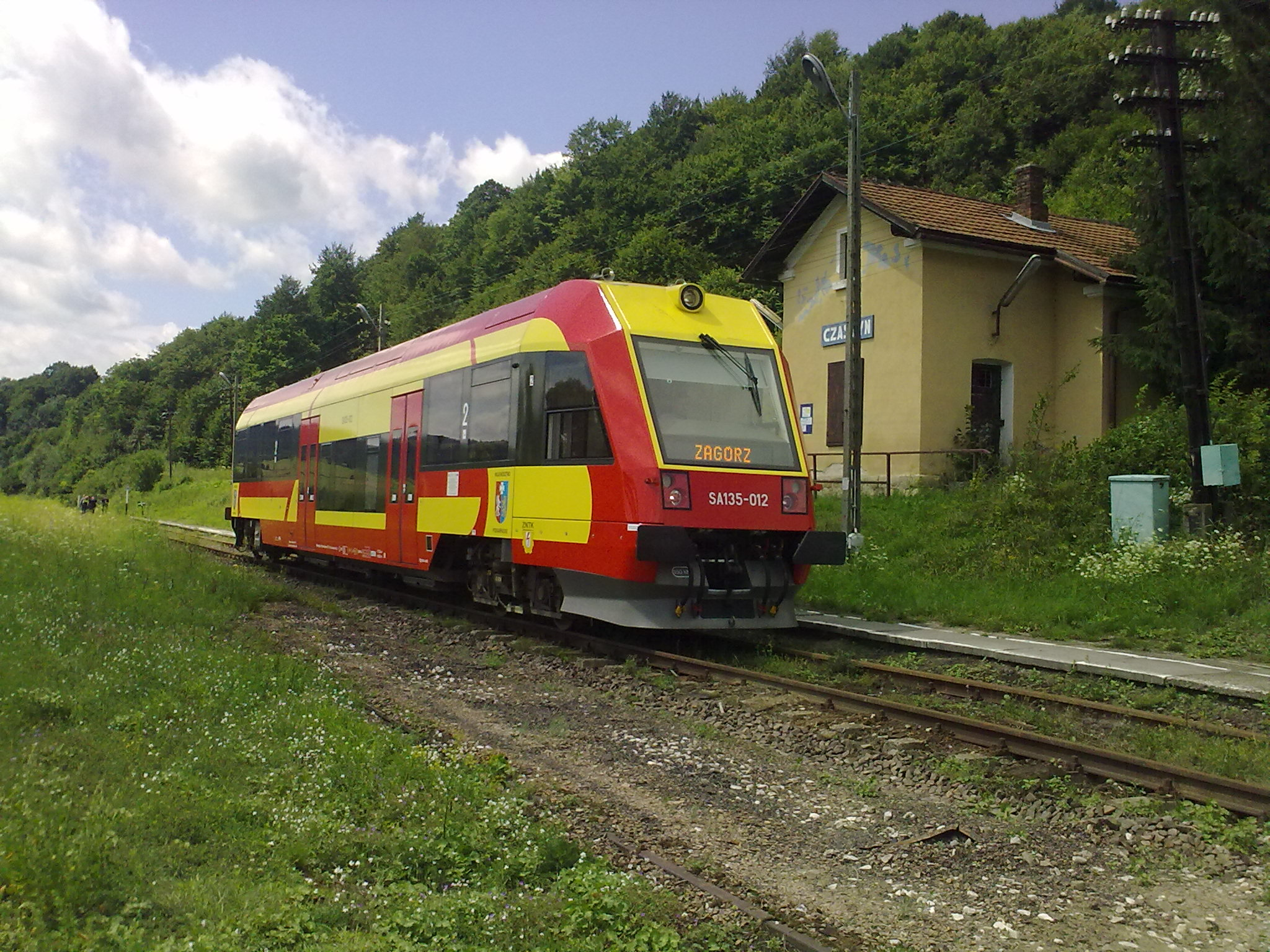 Szynobus Pesa SA 135-012 w stacji Czaszyn.